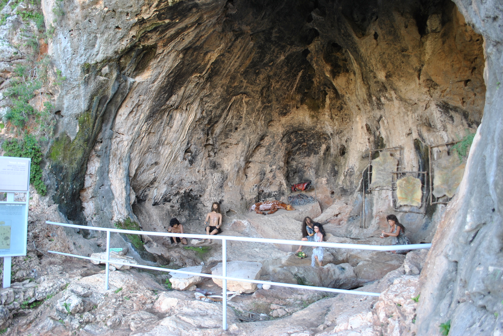 Jamal Cave, Mount Carmel, Israel